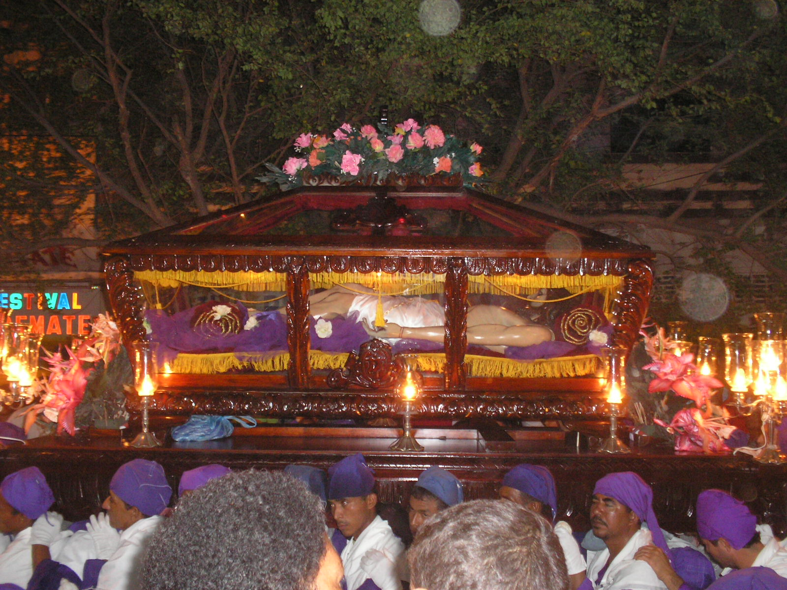 Una muestra de la celebracion de semana santa, procesion del santo sepulcro el viernes santo